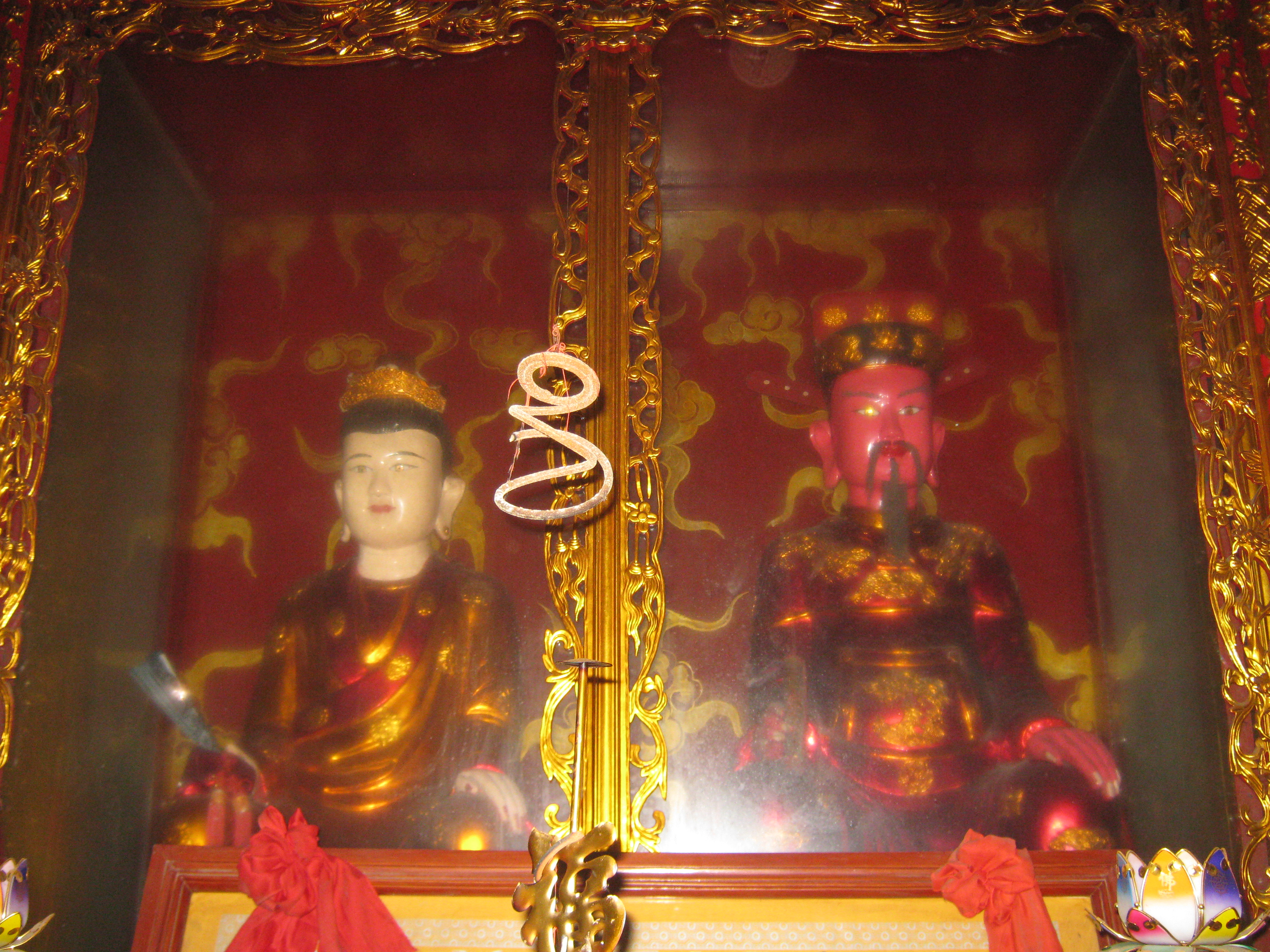 Đình Bến ở Phụng Công, Văn Giang, Hưng Yên - Nơi thờ sứ quân Lã Đường - vị tướng thời vi:12 sứ quân.